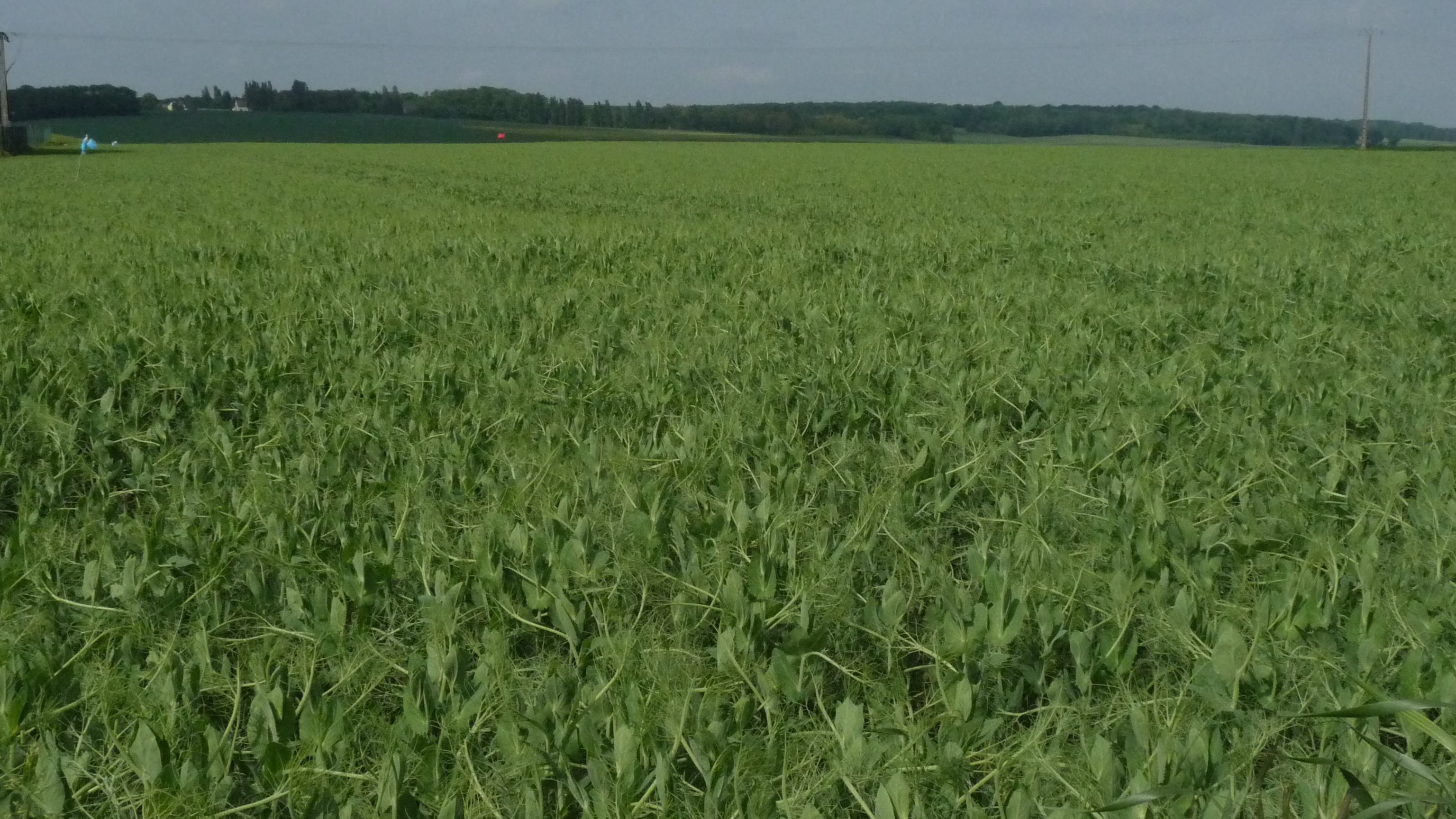 Champ de pois protéagineux (Pisum sativum, type 'Afila') à Hargeville (Yvelines, France)